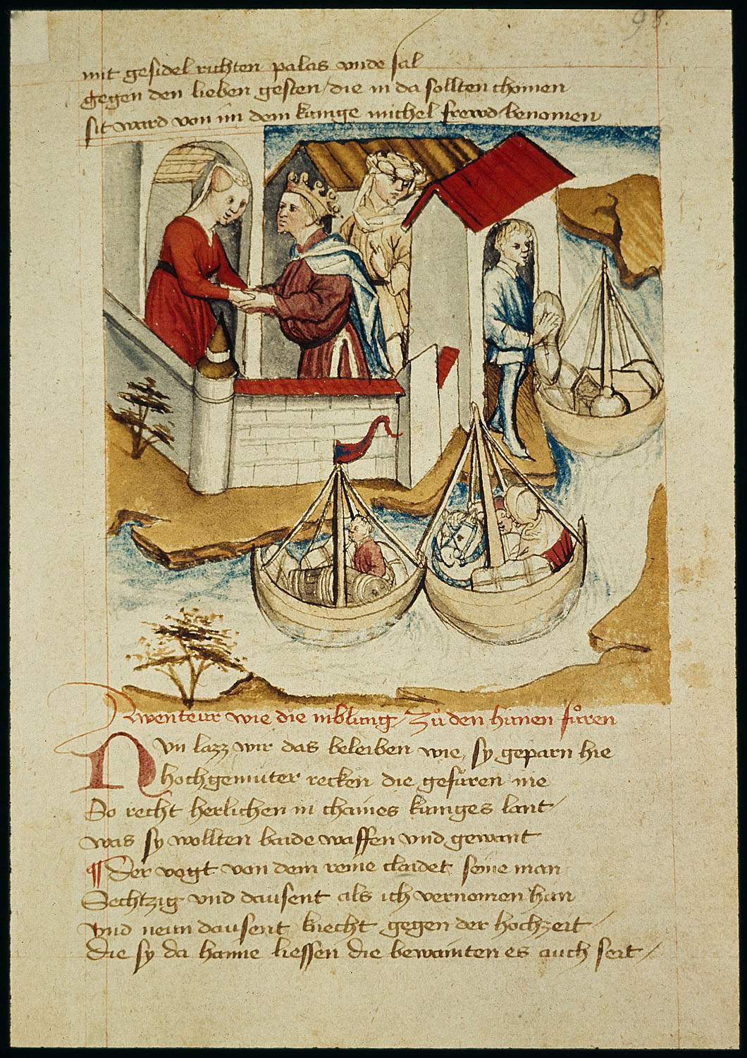 Nibelungenlied. Hundeshagenscher Kodex